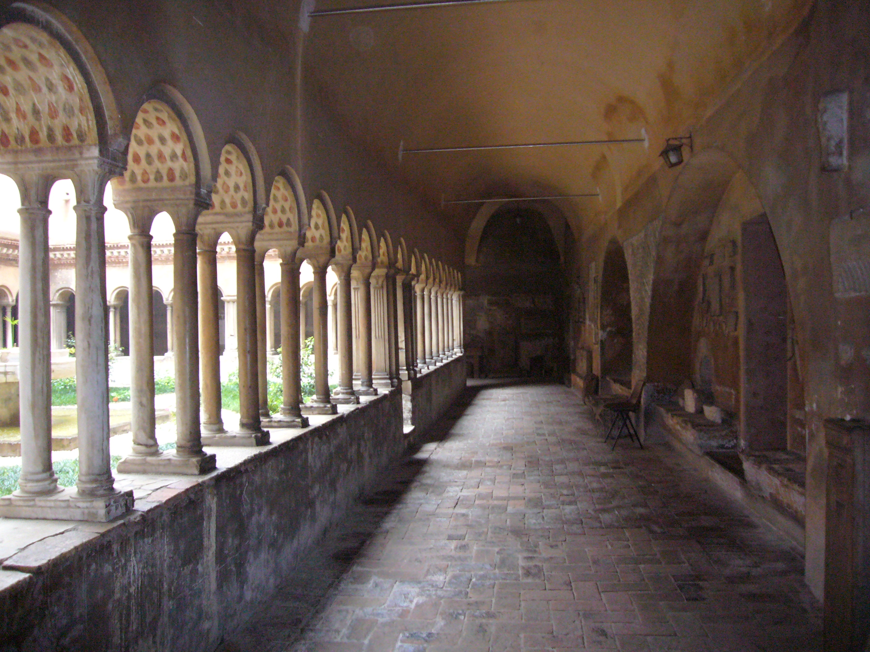 Roma, Santi Quattro Coronati: chiostro